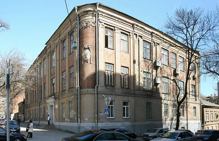 Школа № 49 в Ростове-на-Дону. Бывшая гимназия А. А. Филипьевой.